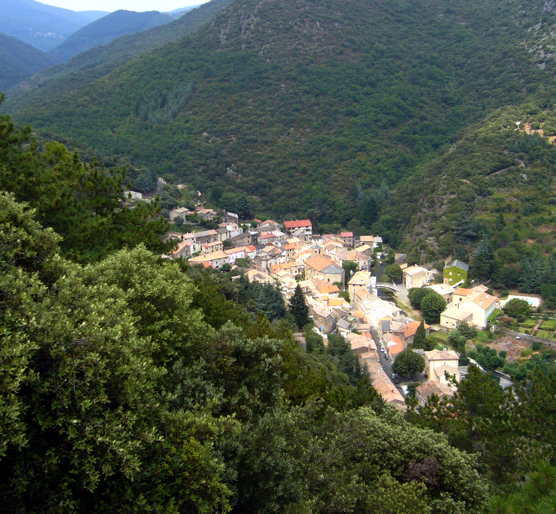 Cabrespine village